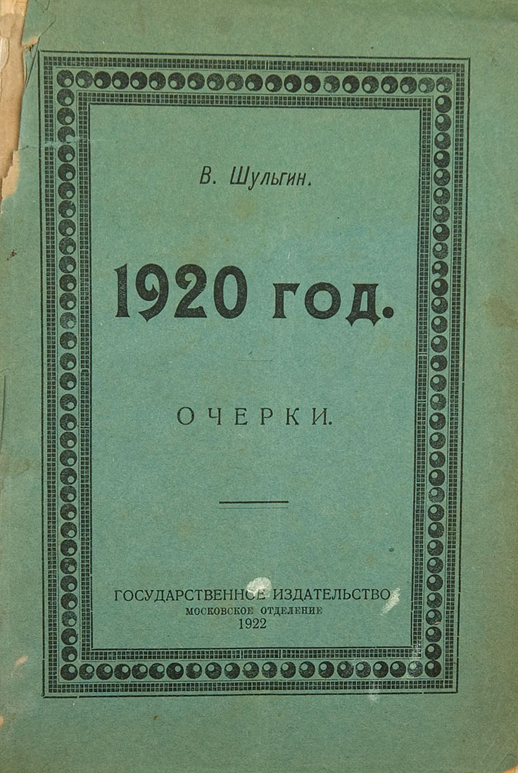 Обложка книги В. В. Шульгина "1920"